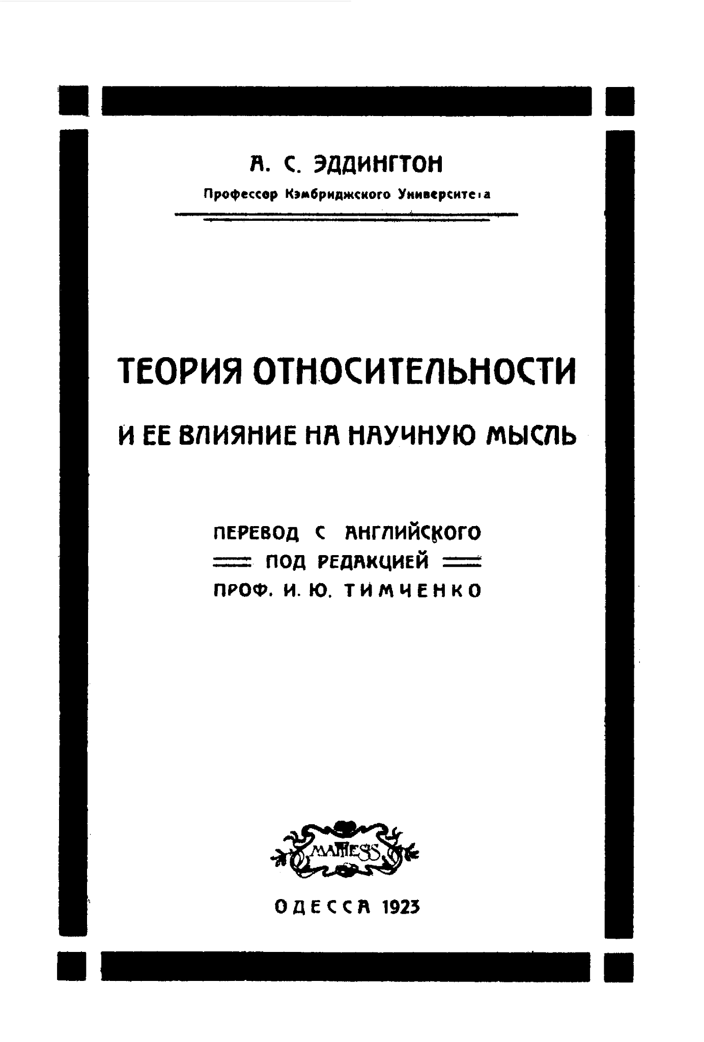 Обложка книги: А. С. Эддингтон. Теория относительности и ее влияние на научную мысль. Речь, читанная 22 мая 1922 года. Перевел с английск. М. З. Кайнер под ред. проф. И. Ю. Тимченко. Одесса: MATHESIS, 1923.